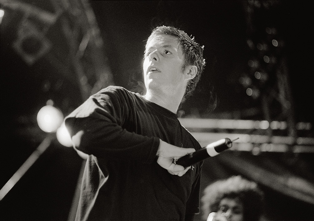 Michi mit Afrob in Schenefeld